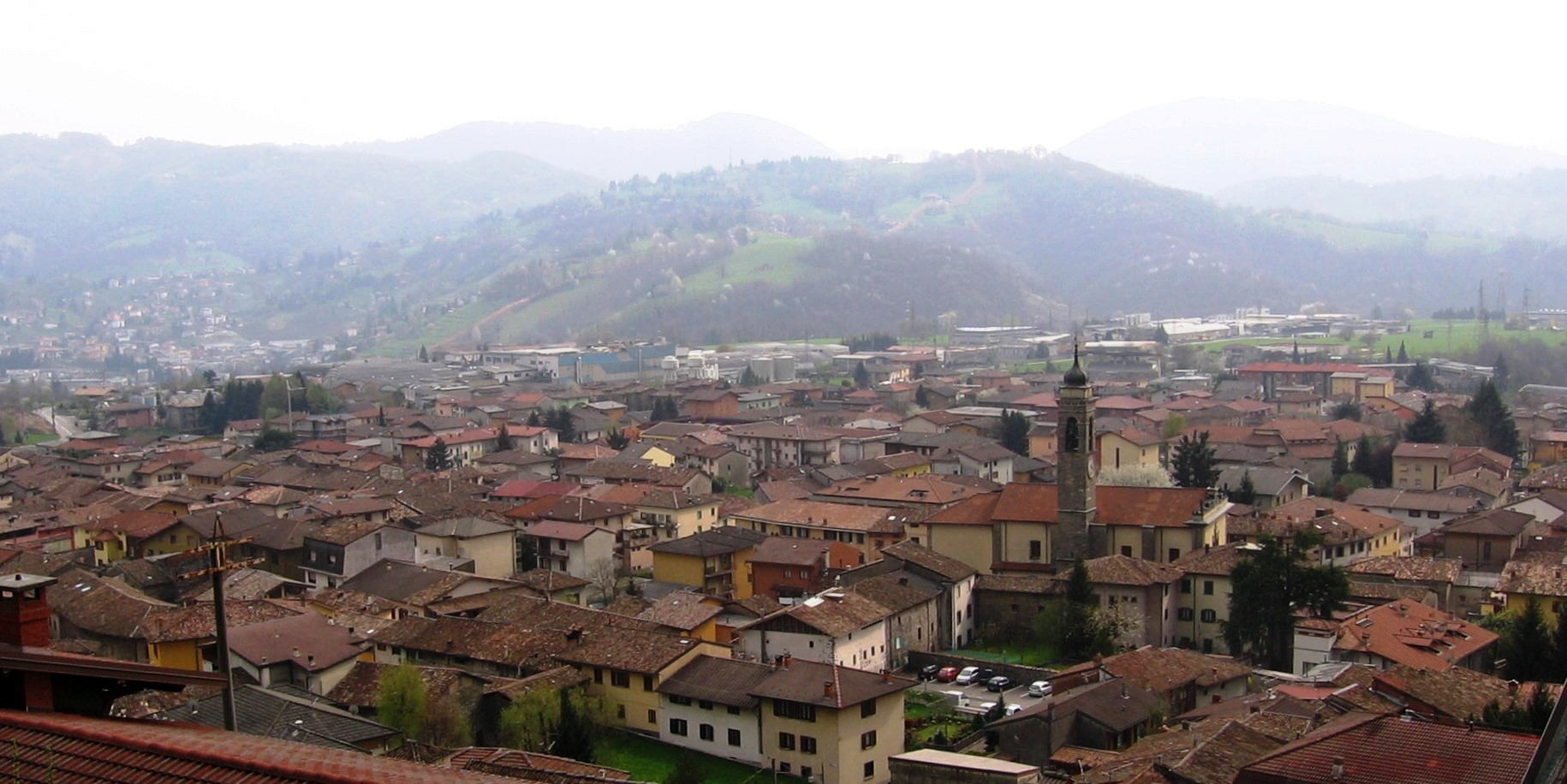 Casnigo, Bergamo, Italia